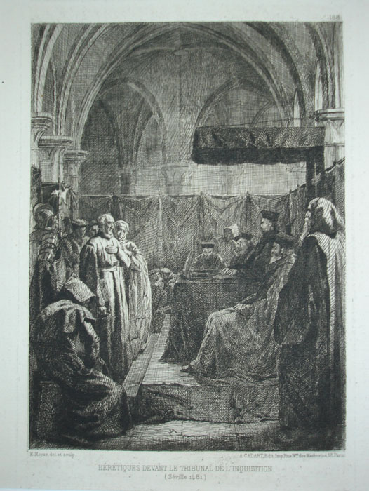 Heretiques devant le tribunal de l'Inquisition. Seville. 1481 (Herejes en el tribunal de la Inquisición. Sevilla. 1481). Grabado en agua fuerte.